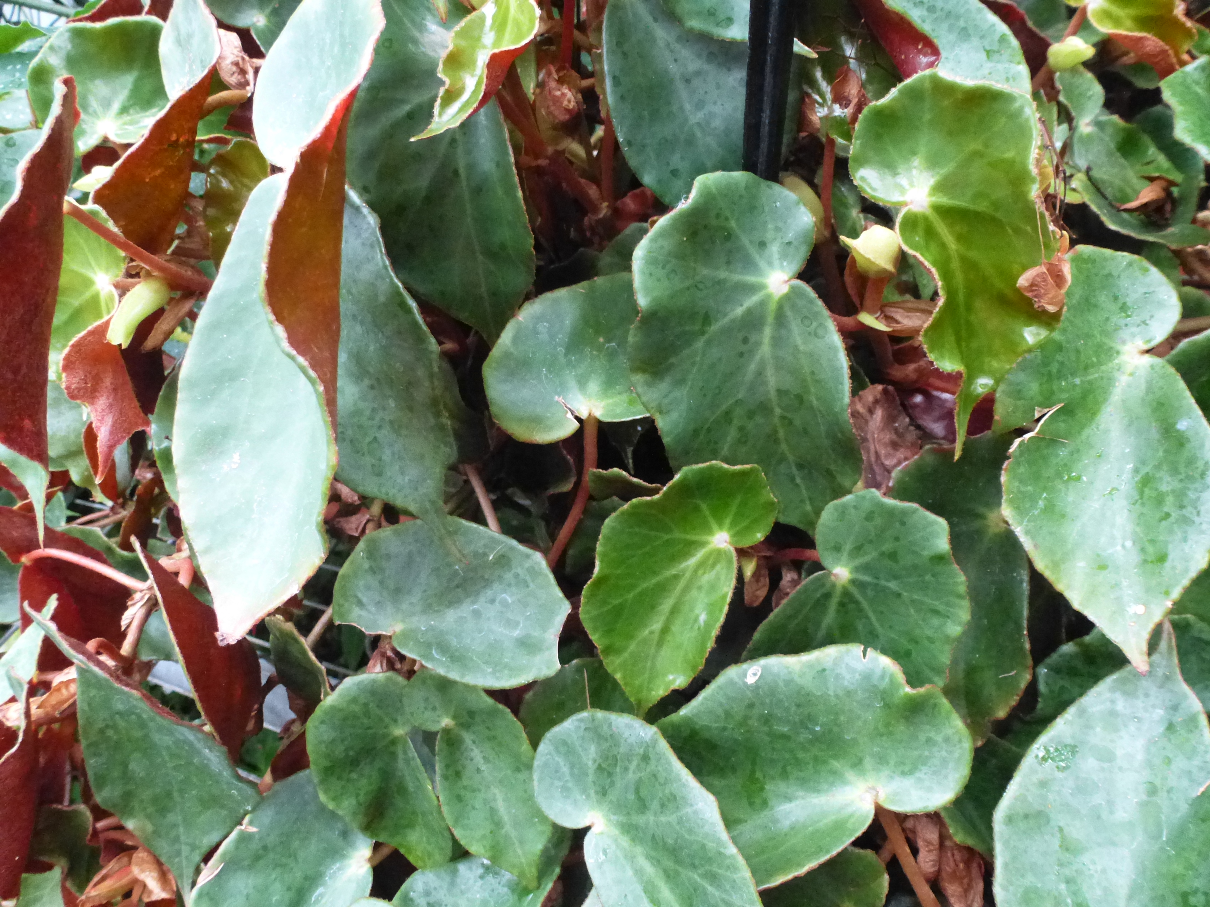 Begonia epipsila Brade. Conservatoire du bégonia, Rochefort-sur-Mer, Charente-Maritime (17), France, Europe.